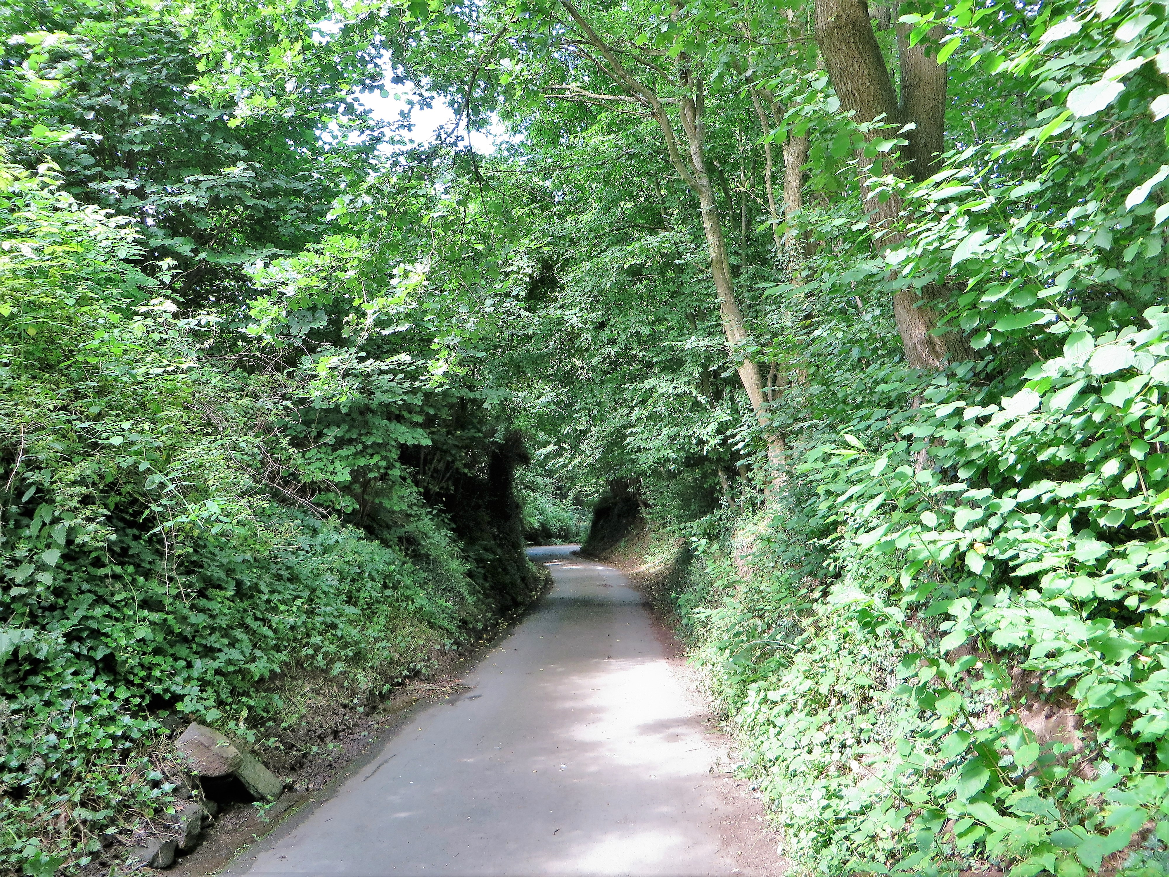 Geschützter Landschaftsbestandteil 1.4.2.40 „Hohlweg am Kronocken“ in Hagen-Hohenlimburg, Am Kronocken. Es handelt sich im Nordosten von Henkhausen um einen asphaltierten Hohlweg, der beidseitig von einem artenreichen Gehölzsaum gekrönt wird. Der Hohlweg liegt im Landschaftsschutzgebiet „Bemberg“.